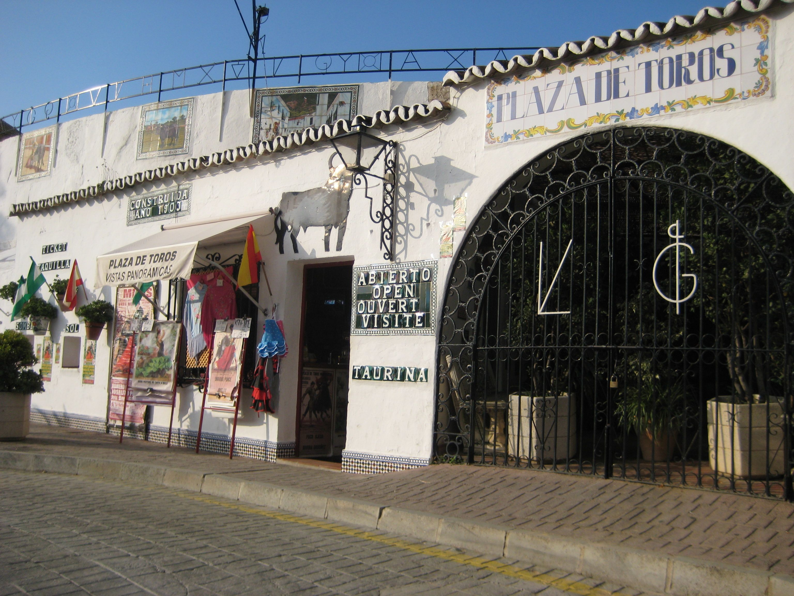 Mijas, Plazza de Torros an Arena